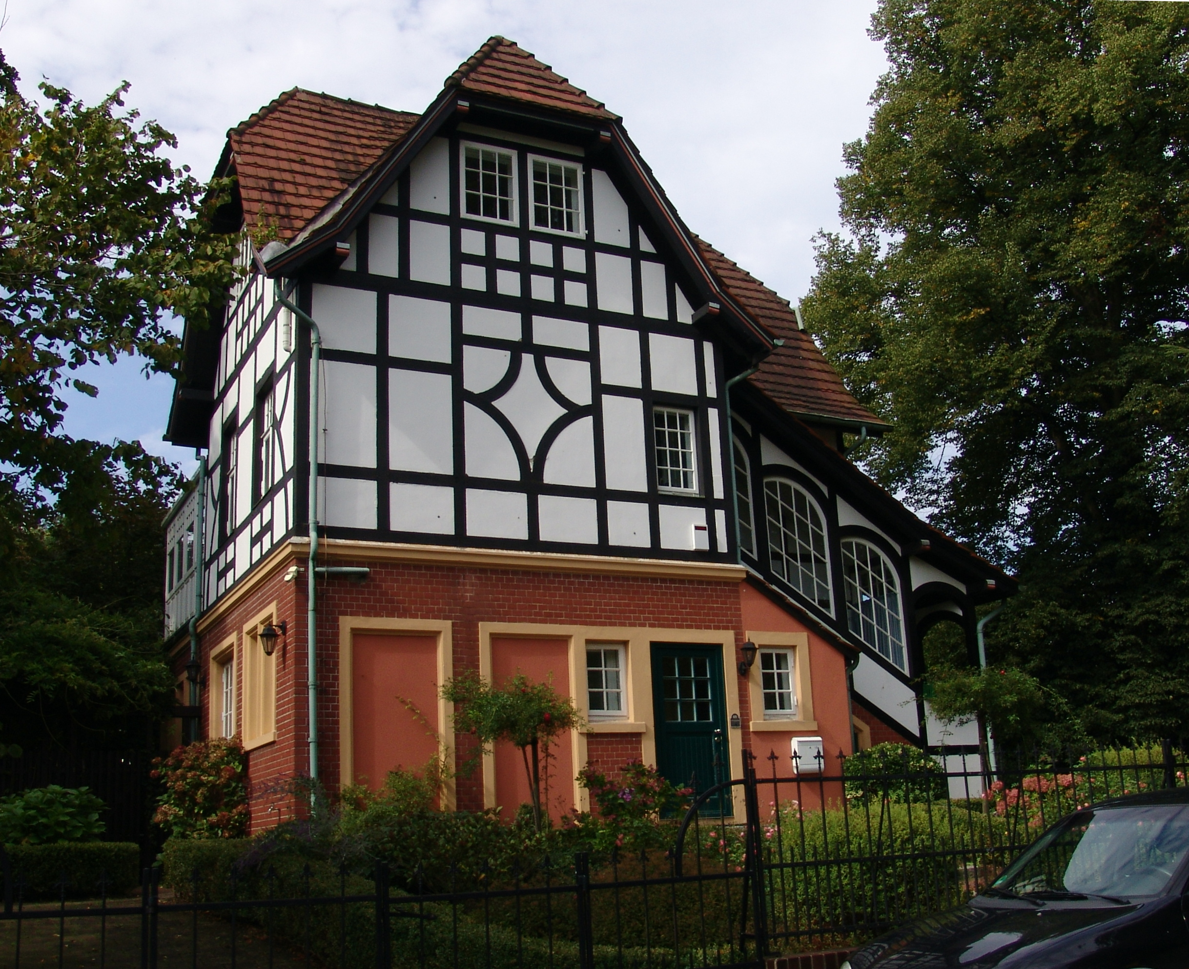 Strom-und Wasserversorgungszentrale in Bremen, Meierhofstraße 2.Das abgebildete Objekt ist ein geschütztes Kulturdenkmal in der Freien Hansestadt Bremen, mit der Nr. 1299 beim Landesamt für Denkmalpflege registriert.